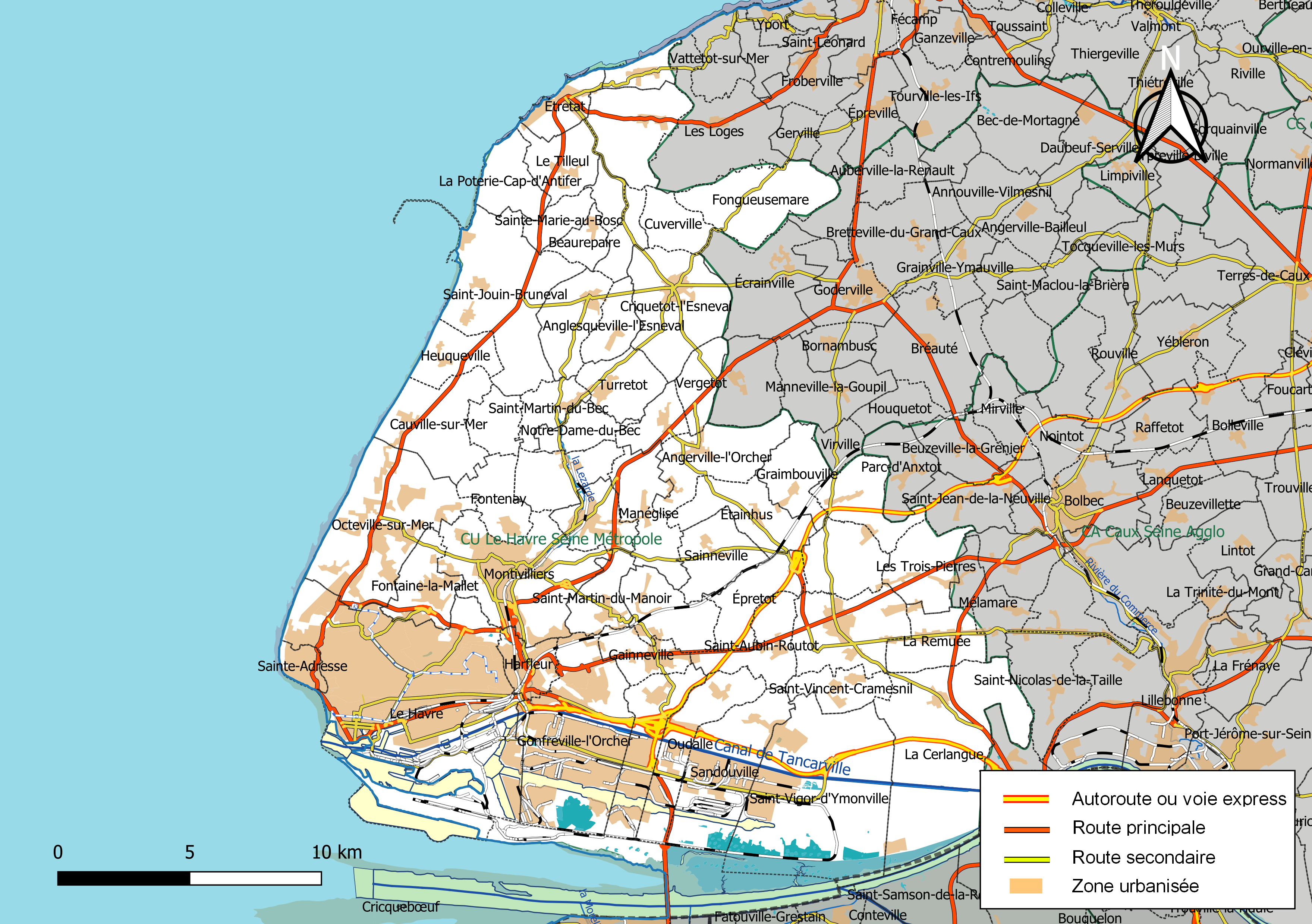 Carte géographique de l'intercommunalité Le Havre Seine Métropole, département de la Seine-Maritime, France. Composition au 1er janvier 2019.